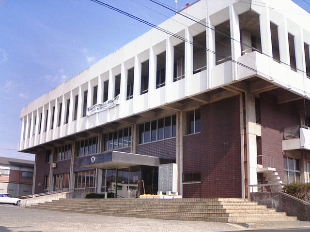 琴平町の役場 - 日本国香川県仲多度郡琴平町。